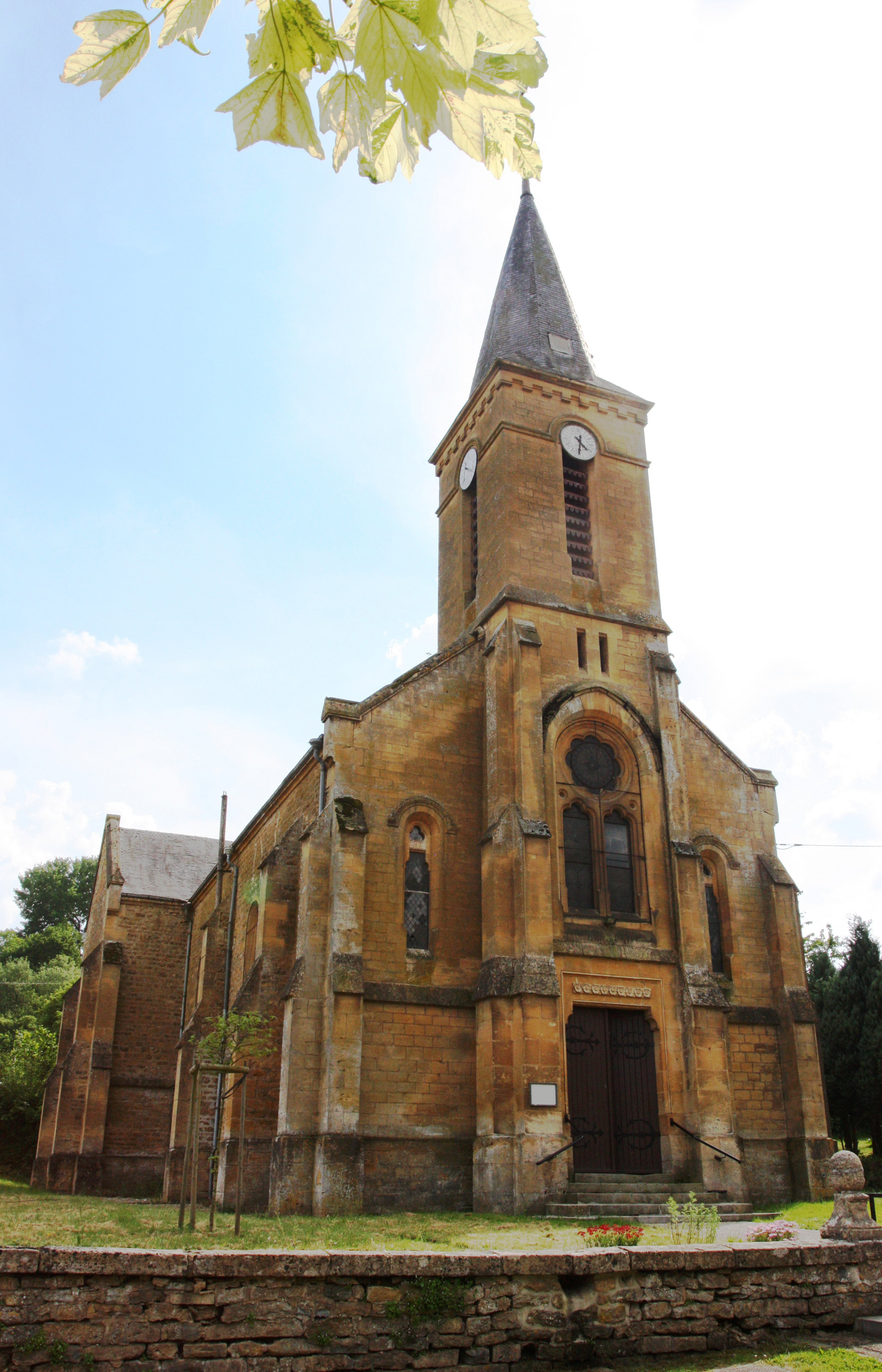 Herbeuval l' Eglise Saint-Michel